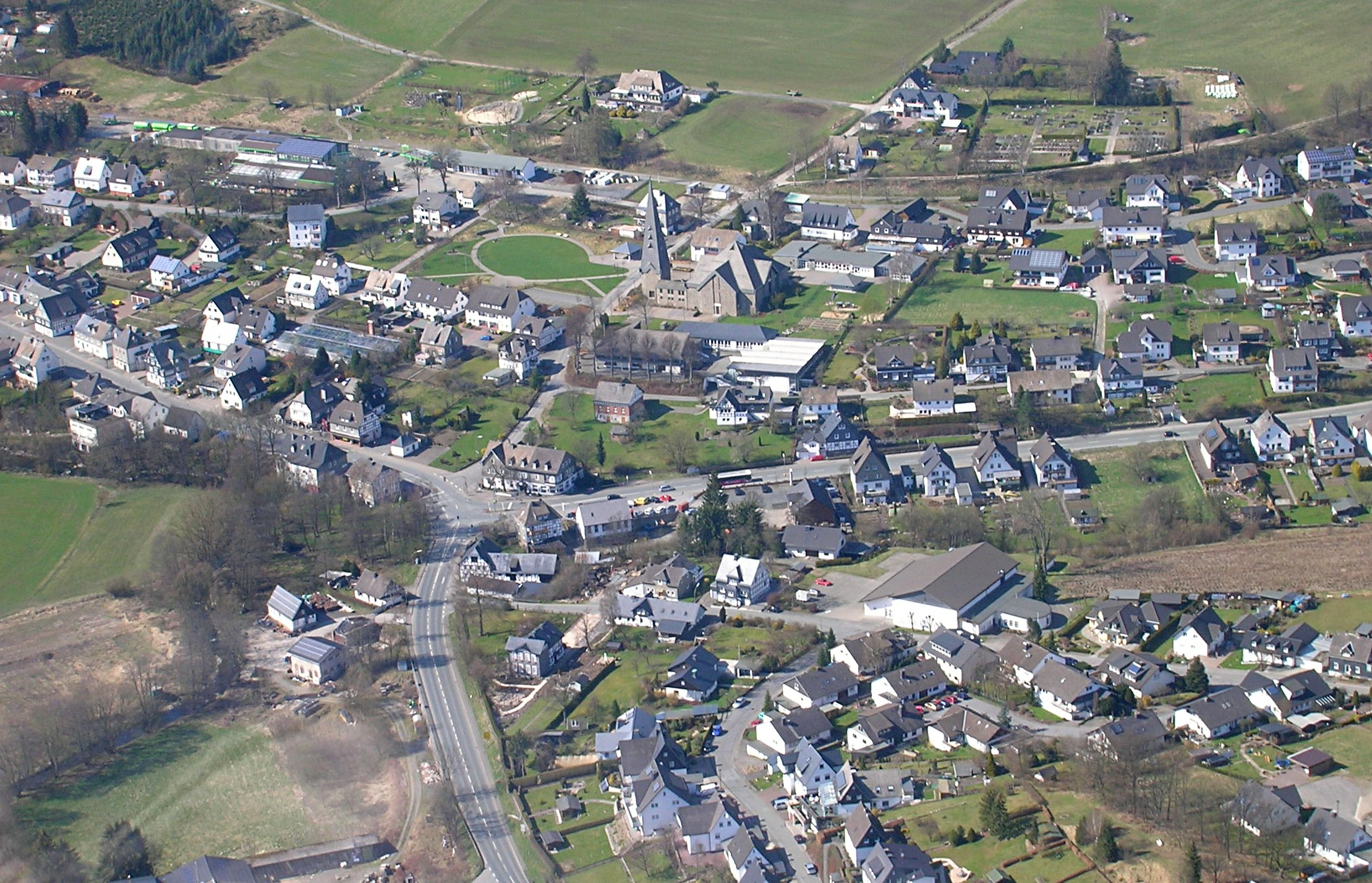 Gleidorf bei Schmallenberg, Ortskern mit Kirche, etwa aus südöstlicher Richtung gesehen.